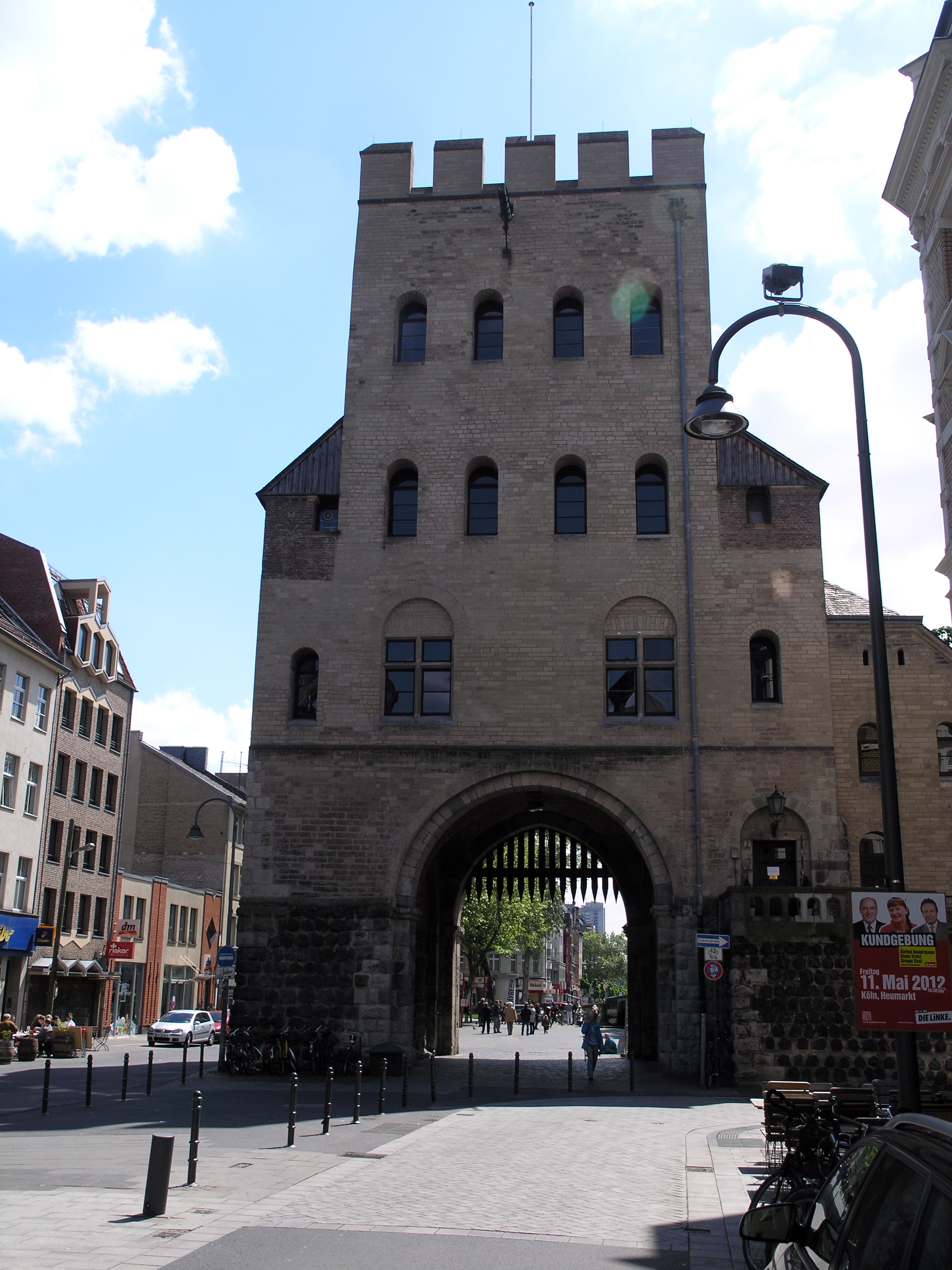 Северный Рейн-Вестфалия, Кёльн – Ворота Святого Северина